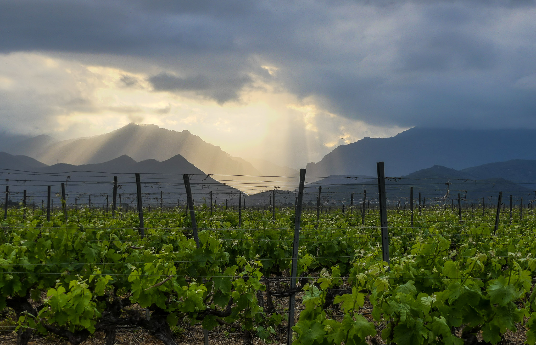 Vignobles à Aghione (Rospa).